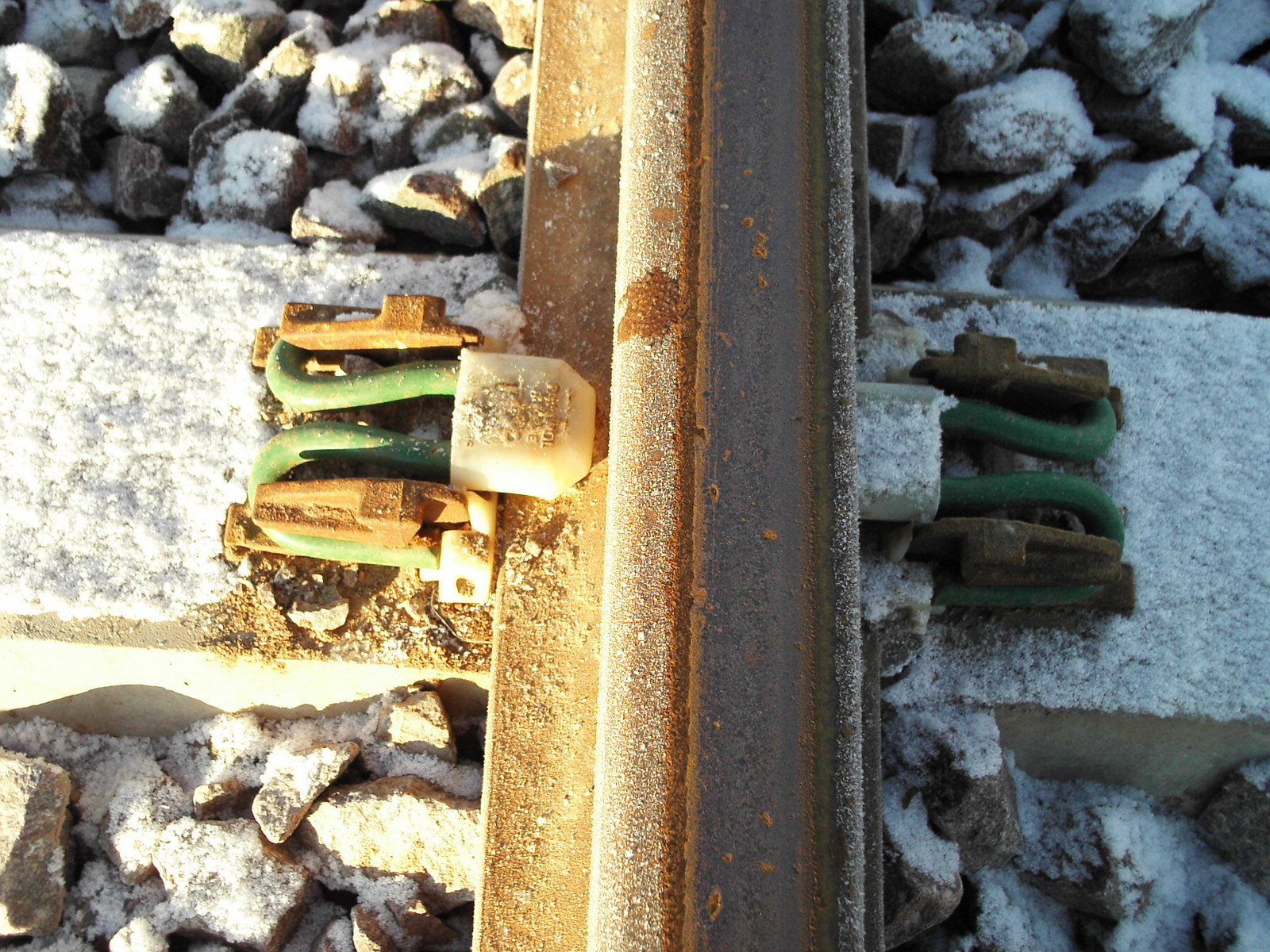 Ny rälsbefästning Pandrol med snäppfäste